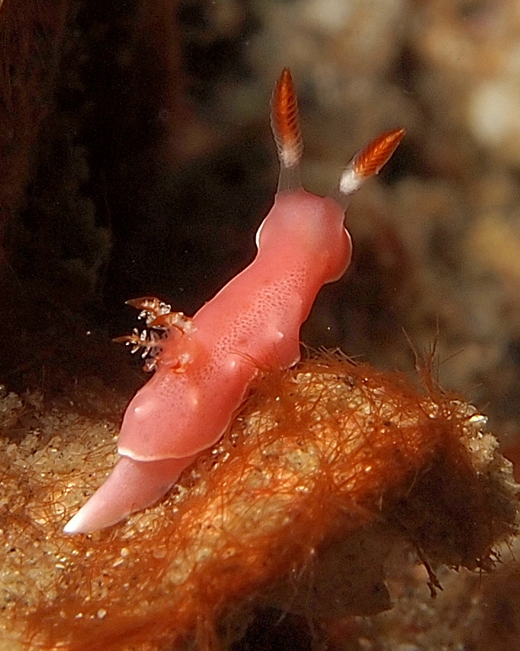 Verconia romeri (synonym: Noumea romeri)